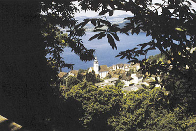 Blick auf die Gemeinde Walchwi, fotografiert von der Ausseregg